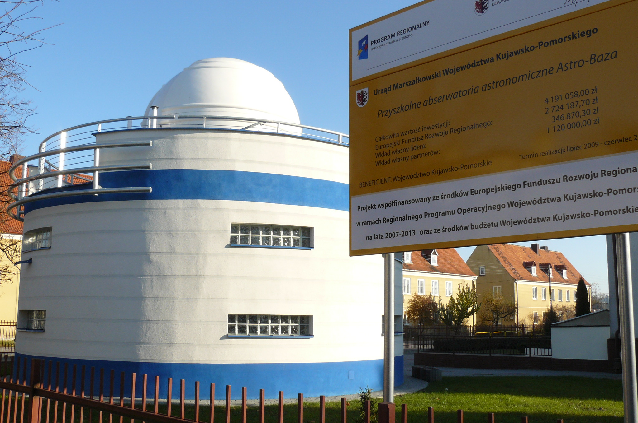 Astrobaza in Jabłonowo Pomorskie (school).